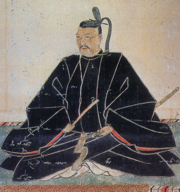 浅野長政 安土桃山時代の戦国武将、大名。Asai Nagamasa.